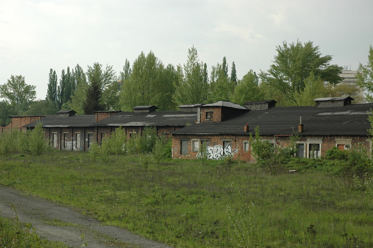 Bývalé depo Báňské dráhy, Ostrava